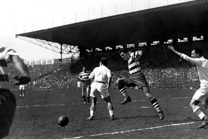 Finale de Coupe de France de football entre FC Sète et Olympique de Marseille en 1934. Le joueur au centre est Istvan Lukacs.